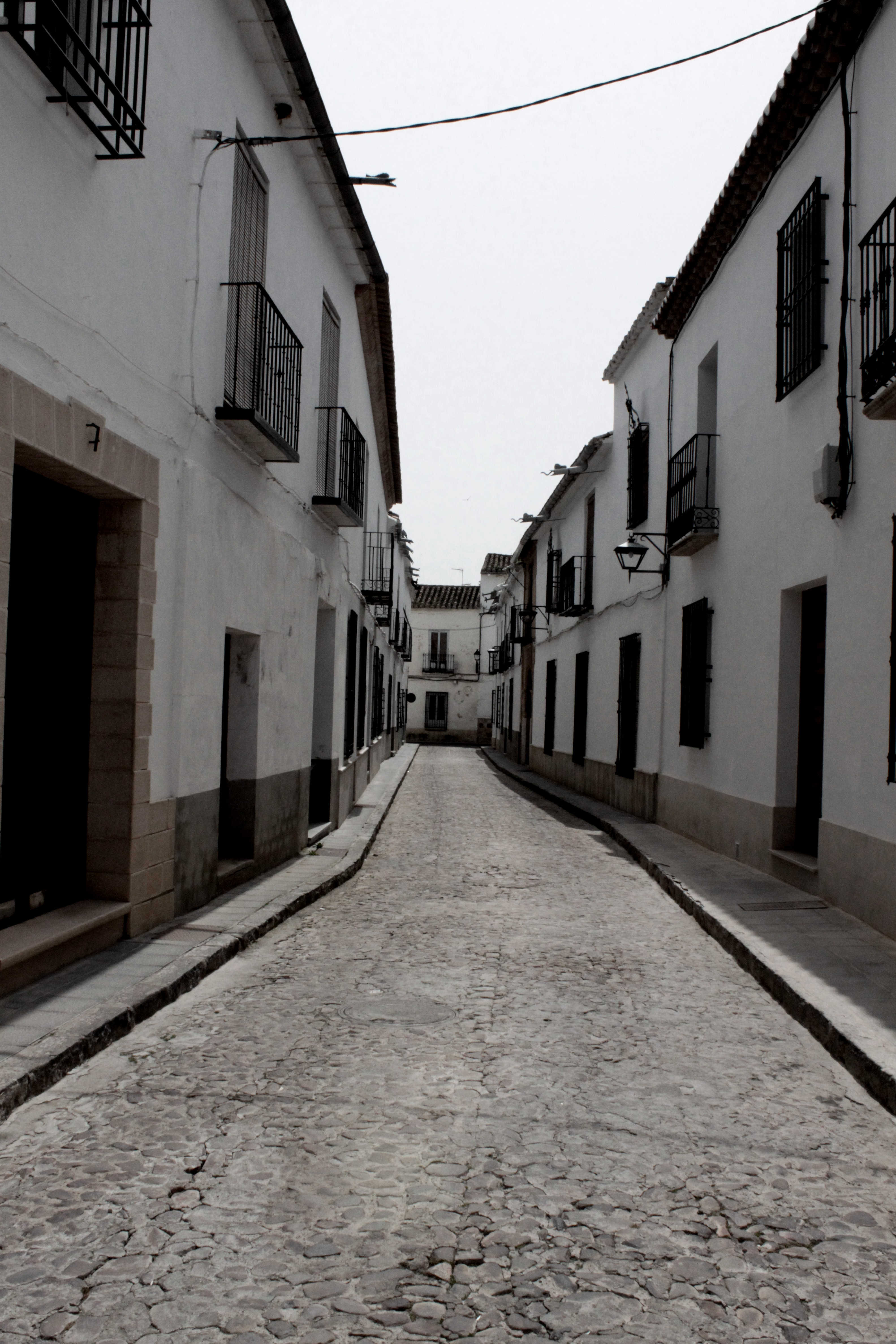 Callejuela de Almagro